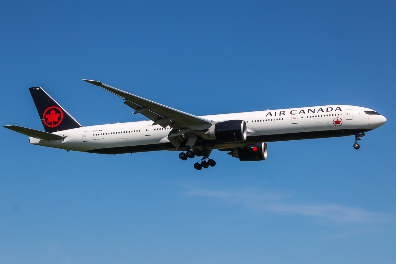 C-FIVW Boeing 777 Air Canada